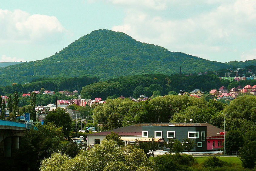 Pohled na Chmelník z nájezdu na Nový most.